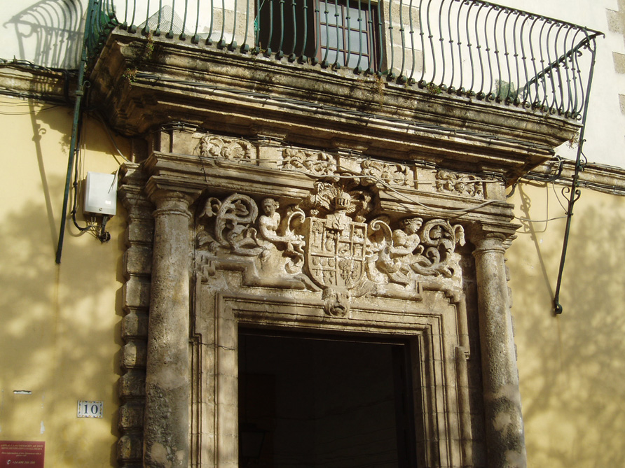 Casa de las Cadenas, edificio monumental de El Puerto de Santa María, España.